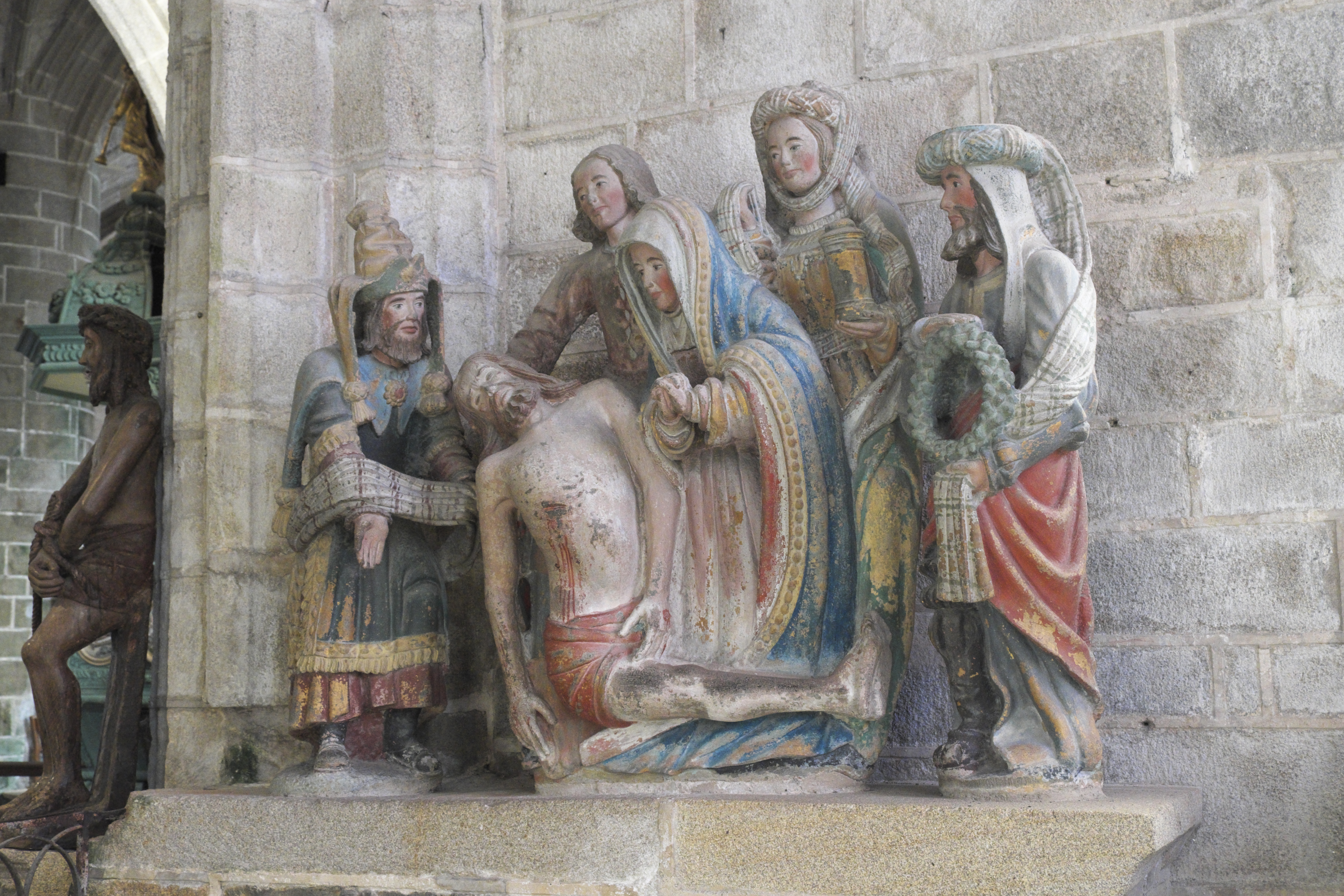 Katholische Kirche Saint-Ronan in Locronan im Département Finistère (Region Bretagne/Frankreich), Grablegungsgruppe